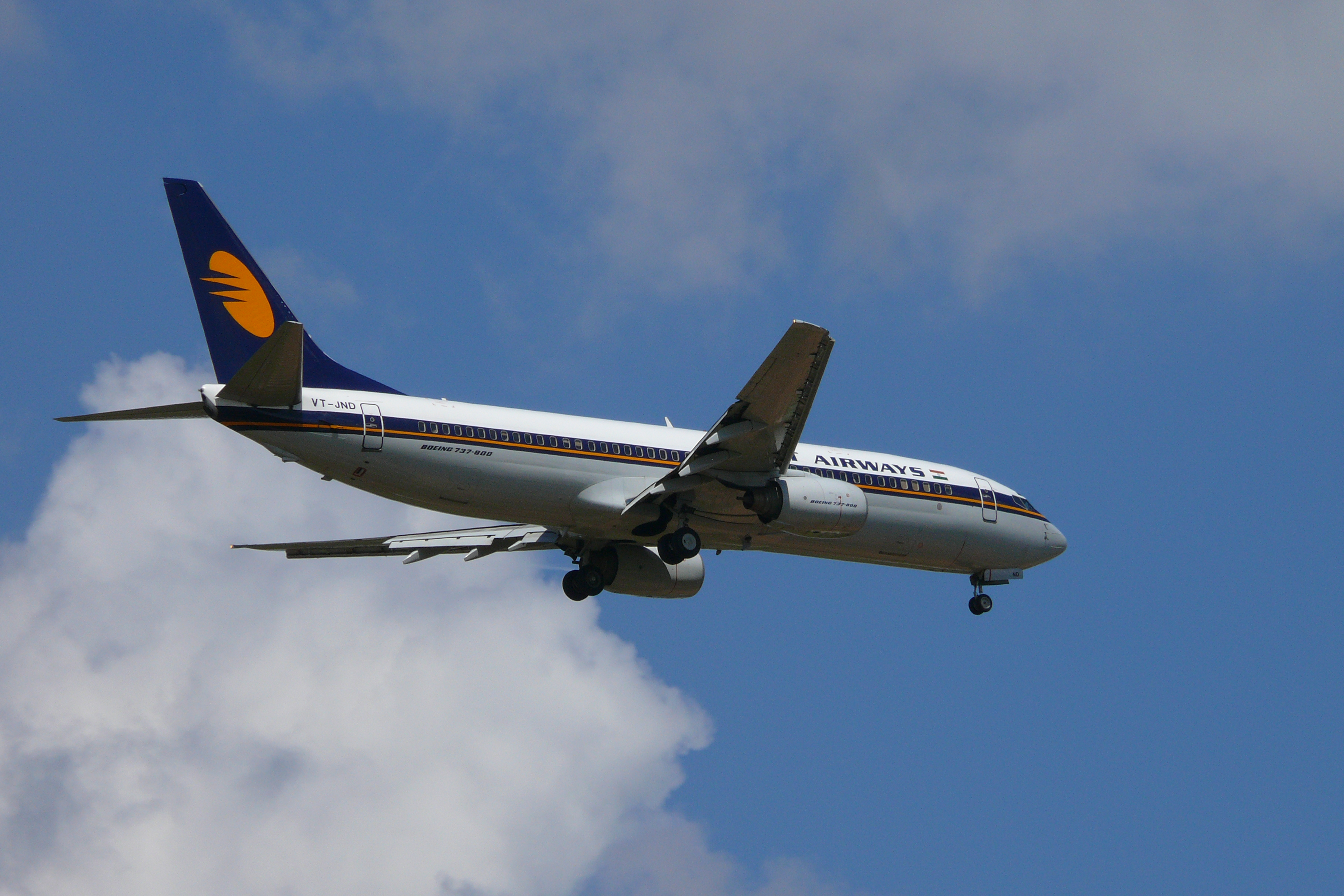 Jet Airways Boeing 737-800 (VT-JND)